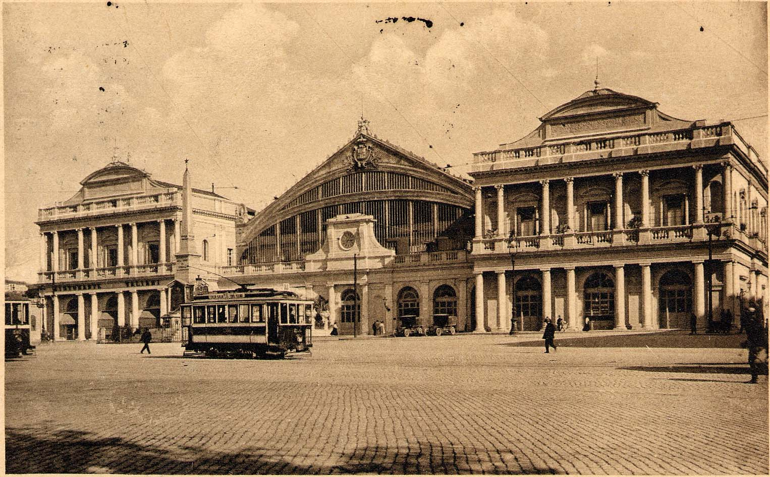 Roma: tram SRTO n. 286 sulla linea 18, presso la vecchia Stazione Termini